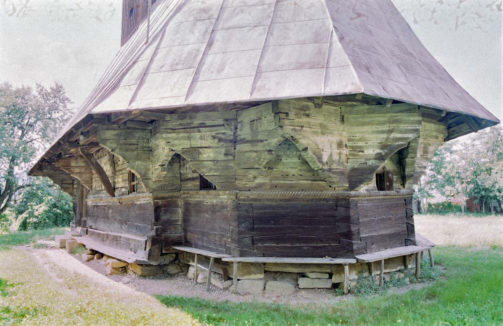 Biserica de lemn din Bălan Josani, butea.